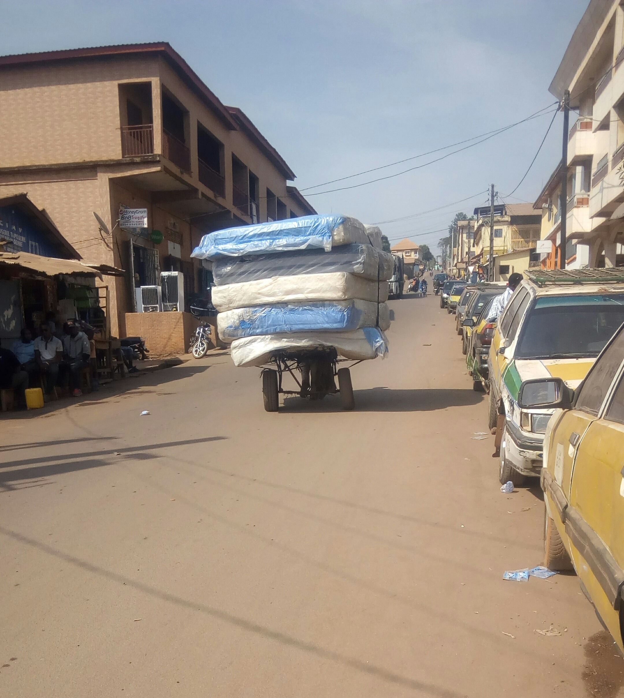 Pousse Pousseur transport de matelas au grande marché de Mamou This is an image with the theme "Africa on the Move or Transport" from: Guinea